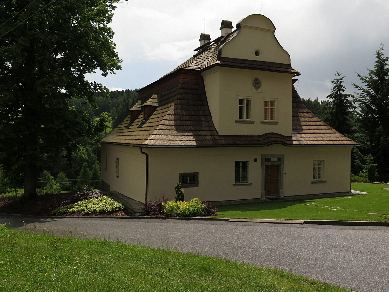 Fara, Roprachtice 1, Roprachtice.